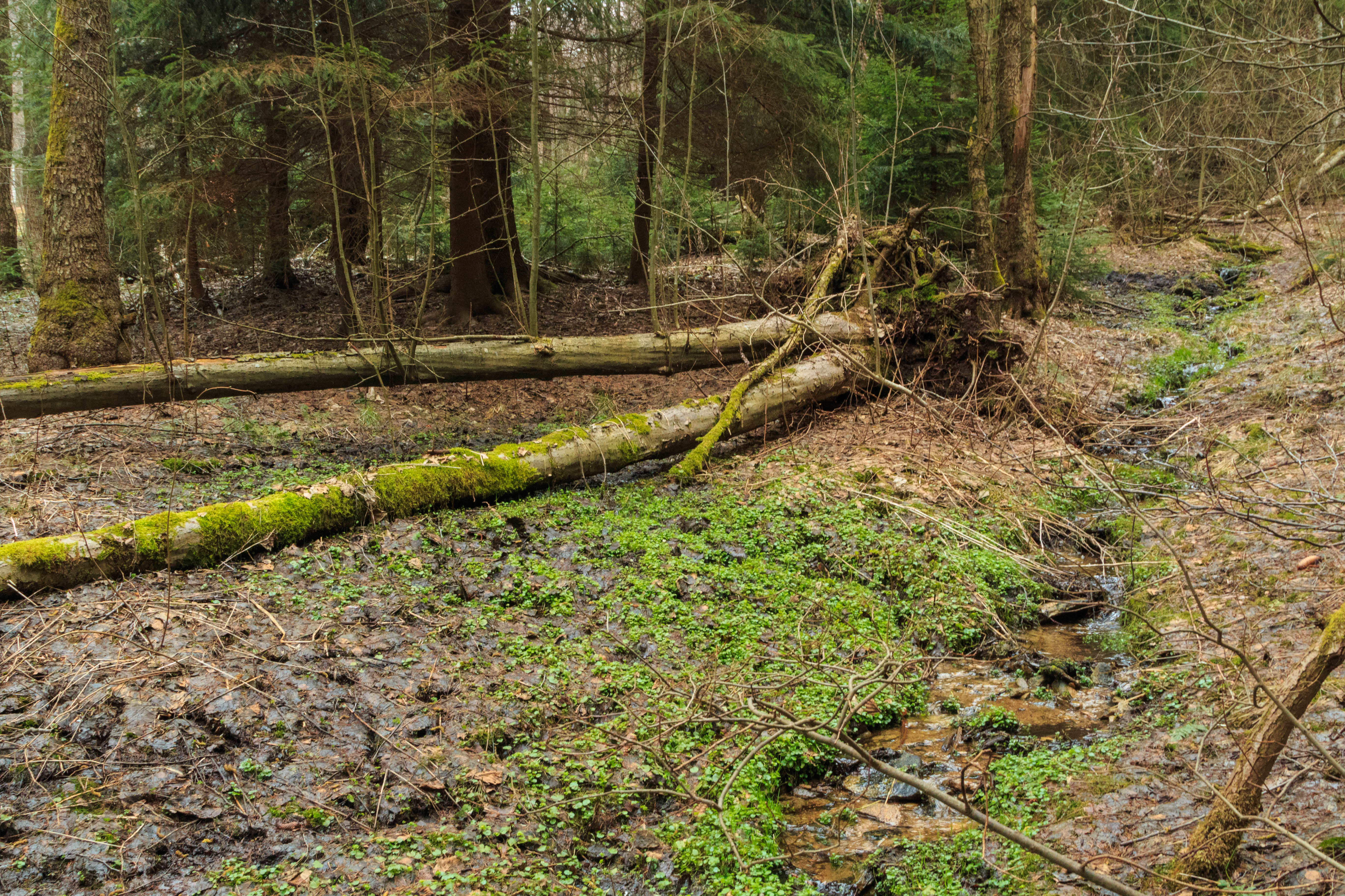 Přírodní rezervace Kačerov Project: Chráněná území.